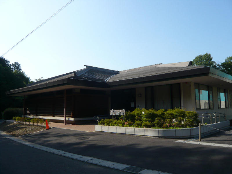 富加町郷土資料館